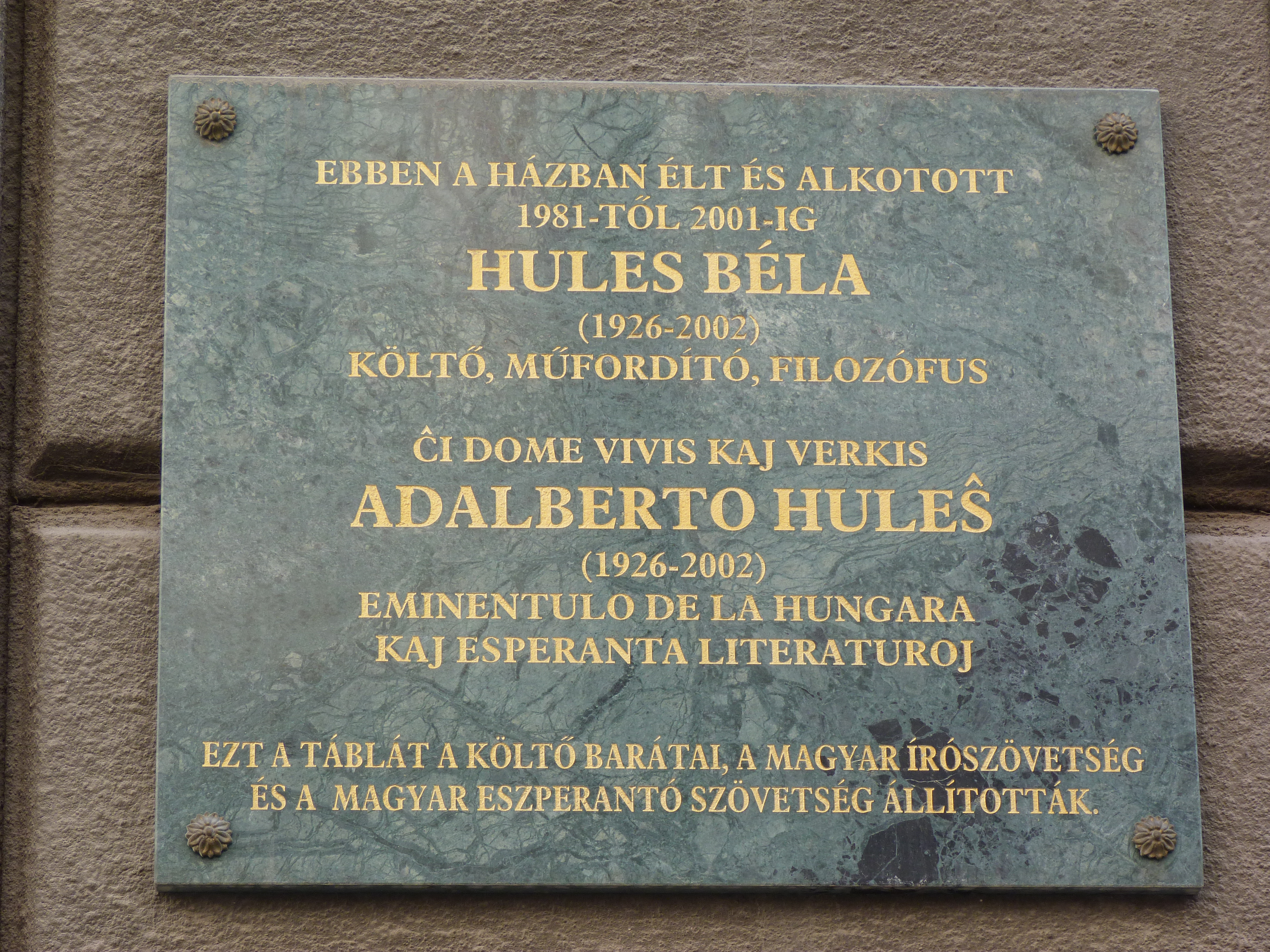 A felvétel 2012. április 3 -án készült Budapesten, a Józsefvárosban. A Kőfaragó utca 3 szám alatti ház falán Hules Béla emléktáblája. Az emléktáblát 2002 december 14-én, szombaton állították Hules Béla költő, műfordító, filozófus tiszteletére, egykori, évtizedekig lakhelyeként szolgáló ház falán. Az emléktáblát a Magyar Írószövetség részéről Bella István Kossuth-díjas költő, a Magyarországi Eszperantó Szövetség részéről Jakab Sándor alelnök avatta. Hules 1926-ban született Zalabéren. 1951-ben az ELTE-n magyar-latin szakon szerzett diplomát. 1953 és 1958 között Nagykanizsán középiskolai tanárként, majd 1964-től 1969-ig Budapesten tudományos kutatóként dolgozott. 1964 és 1969 között Mohácson tanított, majd a sors furcsa fintoraként 1969-től 1979-ig, azaz nyugdíjba vonulásáig Pécsett dolgozott gépészként. Ezt követően költözött fel Budapestre, a Kőfaragó utcába, ahonnan csak pár éve bekövetkezett halála előtt, pár hónappal költözött ki Pest megyei Tinnyére. Első nagy sikerű műve 1985-ben jelent meg Magányos iniciálé címmel, majd ezt követte több sikeres vers, filozófia, esszé és próza kötet. Íráson kívül szerkesztőként is nagyra értékelte a szakma, s évente több százan keresték fel a Zala megyei Vadamoson megtartott rendezvényeit, ahol neves irodalmárok és képzőművészek találkoztak egymással. Ezeknek a találkozásoknak lett az egyik reprezentatív terméke a Vadamosi füzetek című sorozat, amelyben többek között megjelent Csontos Jánosnak és Bella Istvánnak is egy-egy kötete, füzete. Forrás: gondola.hu